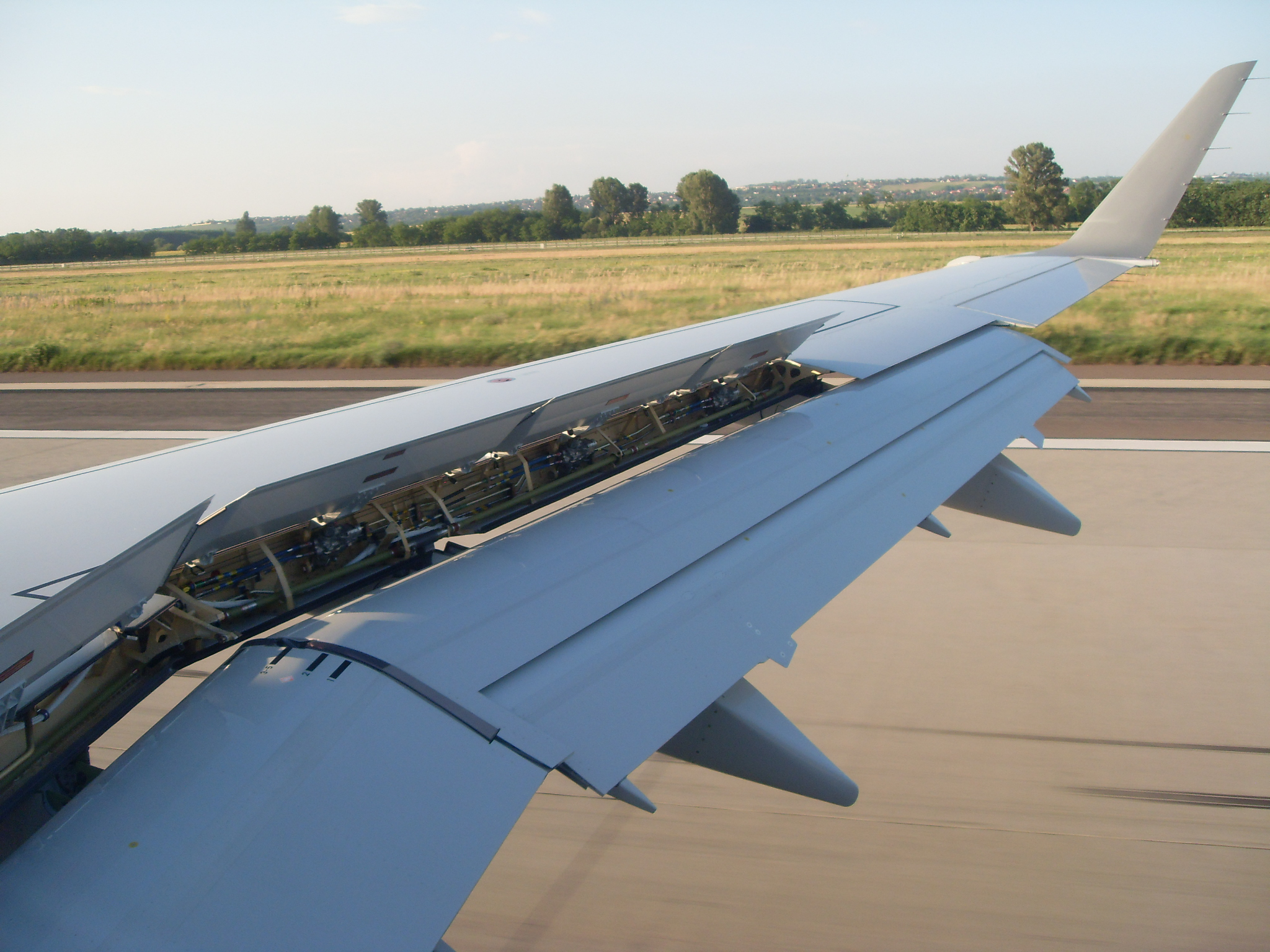 Spolier w samolocie Embraer 170